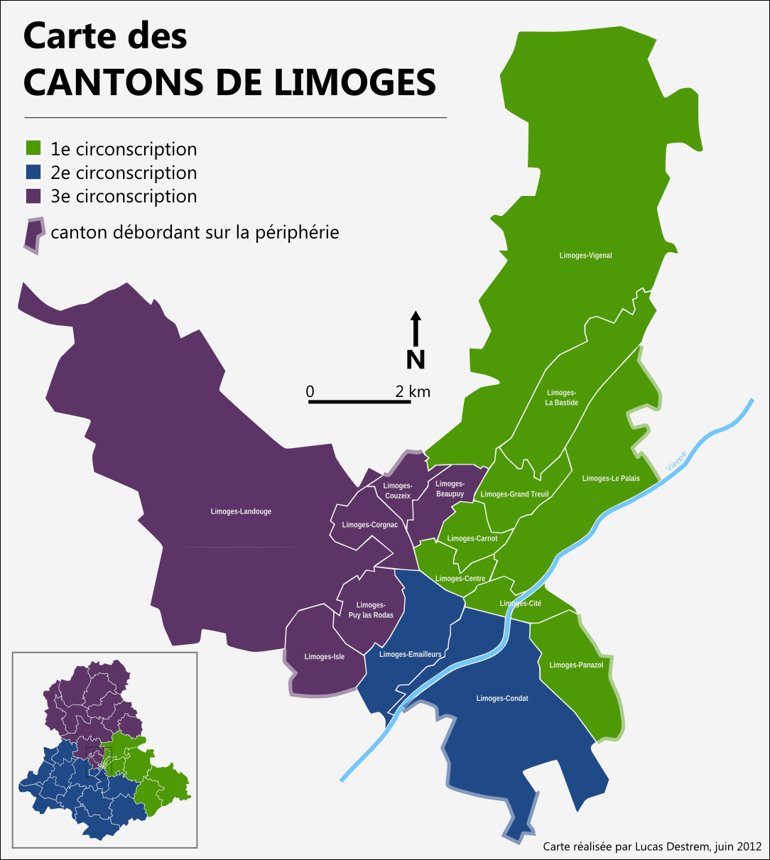 Carte des cantons haut-viennois de la commune de Limoges (Haute-Vienne, France), et circonscriptions électorales 2012.